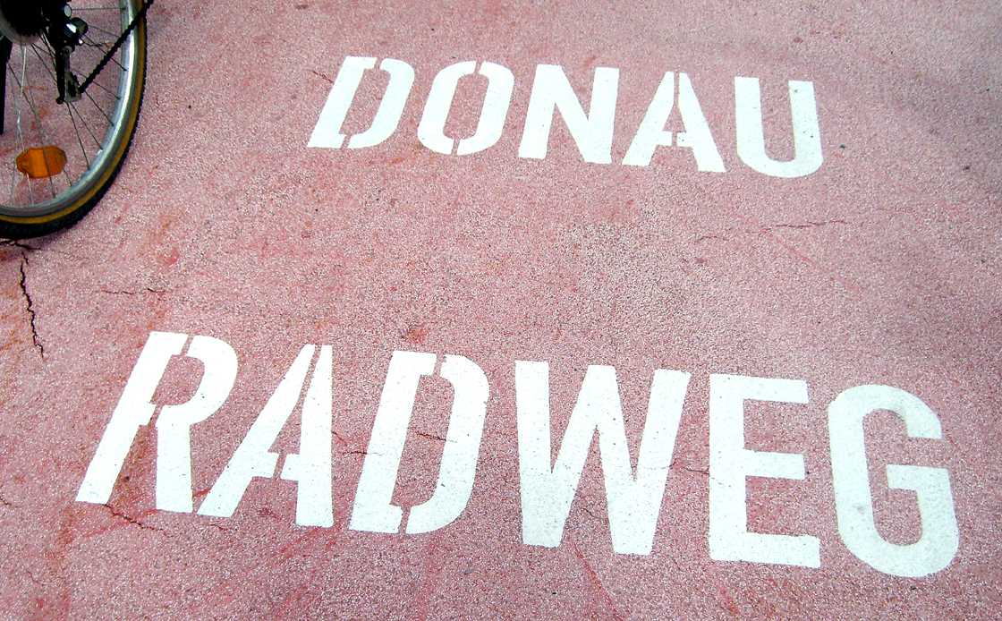 Donauradweg Start in Passau